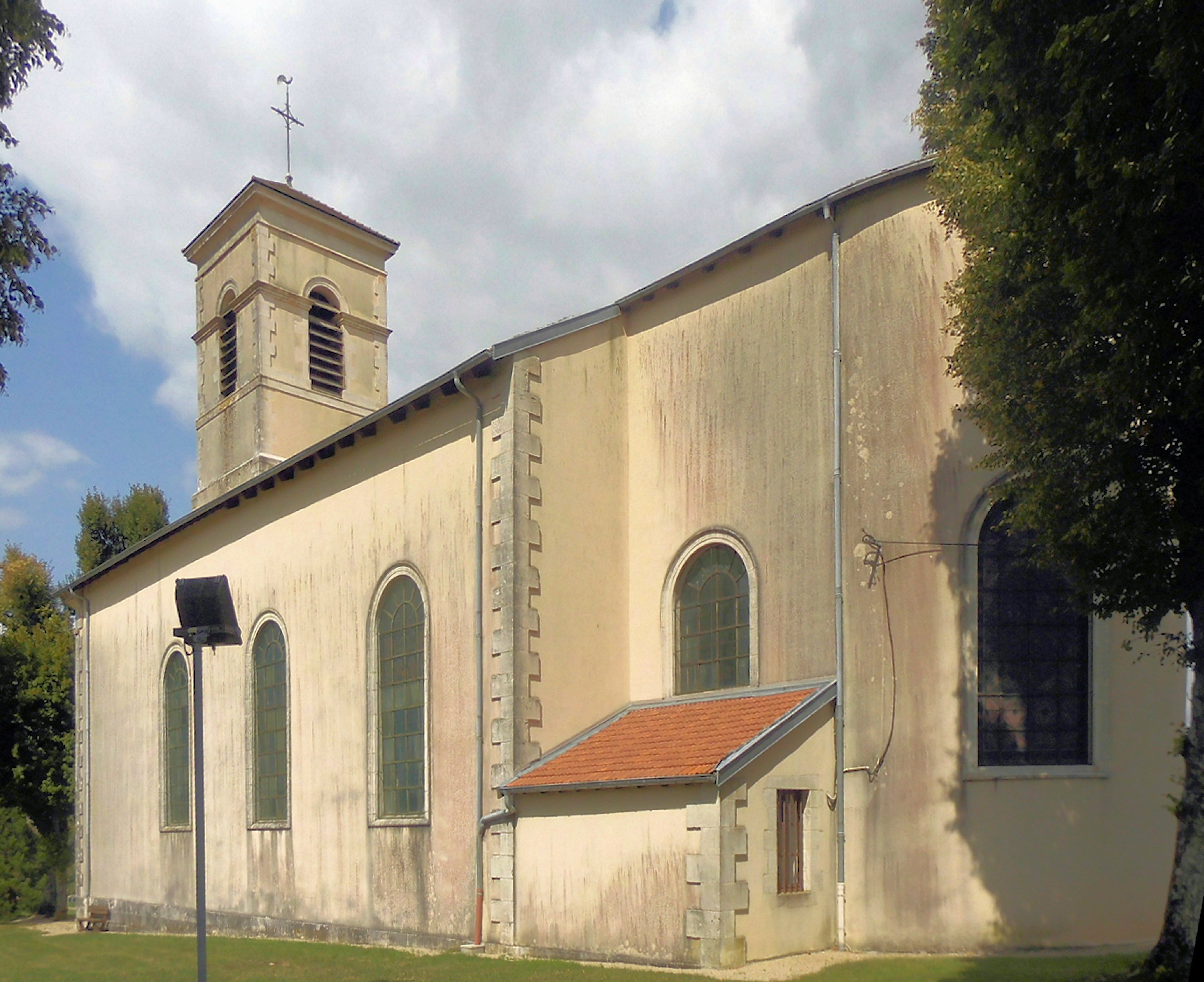 L'église Saint-Epvre de Barville